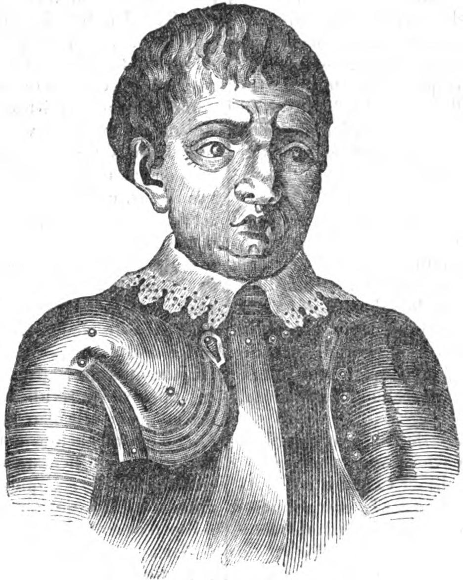 D. Pedro de Menezes, conde de Vianna